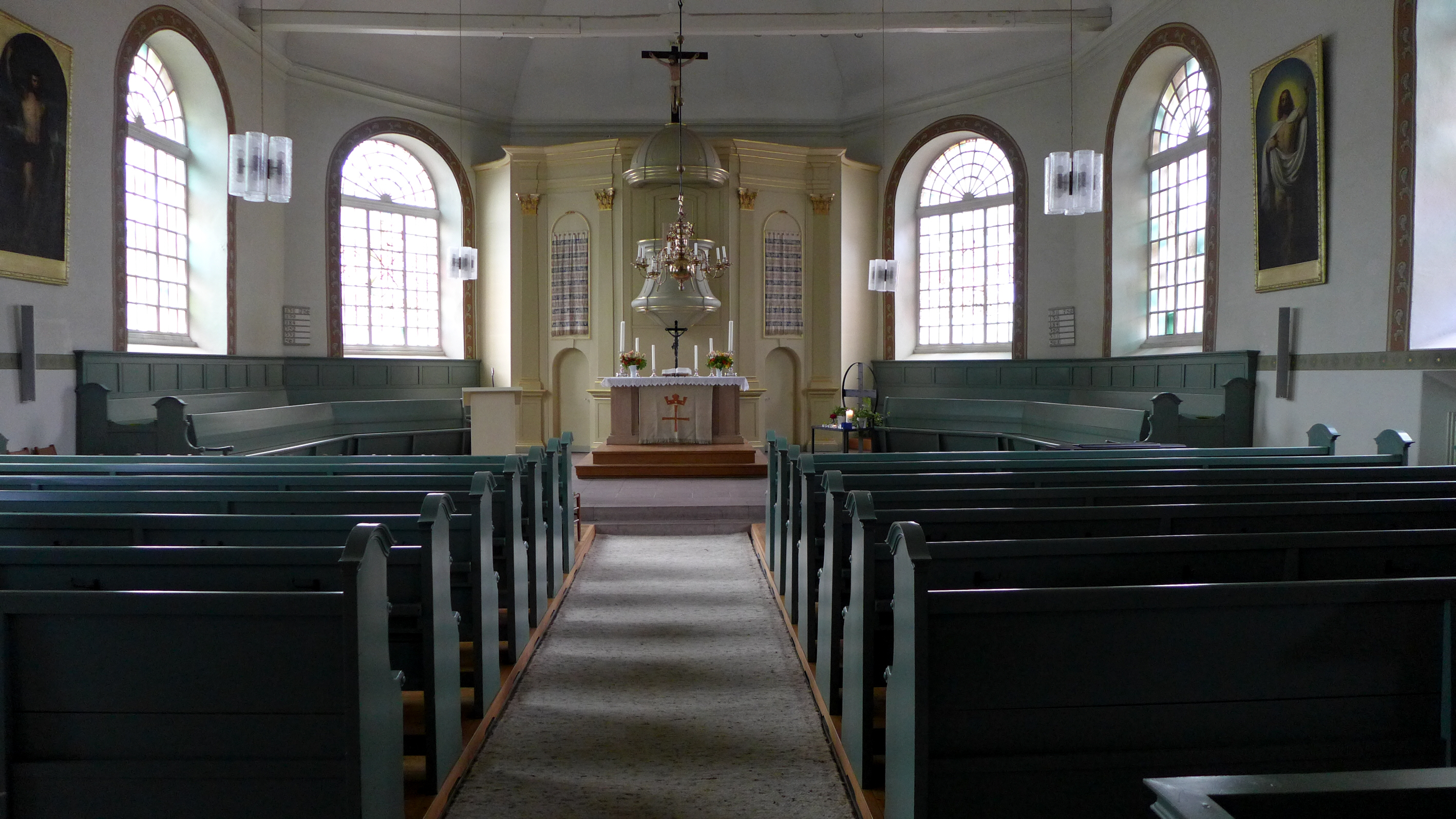 Innenansicht der St. Liborius-Kirche in Bremervörde.